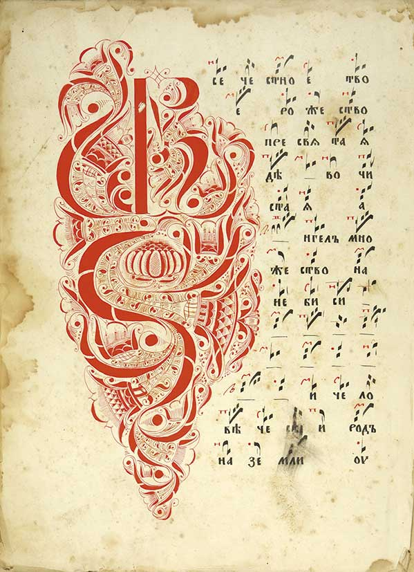 Октоих: крюковый. 2-я половина XIX в.Рукопись. 2° (34,5 х 25 см). [158] л. Полуустав XIX в. Киноварь. Нотация знаменная с киноварными пометами.Нумерация листов внизу, по центру, кириллическими цифрами.Украшения: Инициалы поморского стиля; киноварь – л. 1 об. («В»); 3 («?»); 13 об., 28, 30, 70 об., 101 («Д»); 15 об. («К»); 43, 58 об., 109 об., 121 об., 132, 143 («П»); 72, 111 («Г»); 84 об. («Н»); 85 об. («С»); 96 об., 145 («?»); 120 об. («Оу»); 130 об. («М») (всего 22).Вязь: первая буква – черная, остальные – киноварь (л. 1, 3, 13 об., 15 об., 28, 30, 43, 58 об., 70 об., 72, 84 об., 85 об., 96 об., 101, 109 об., 111, 120 об., 121 об., 130 об., 132 об., 143, 145.Бумага: целлюлозная, без штемпелей, высокого качества.